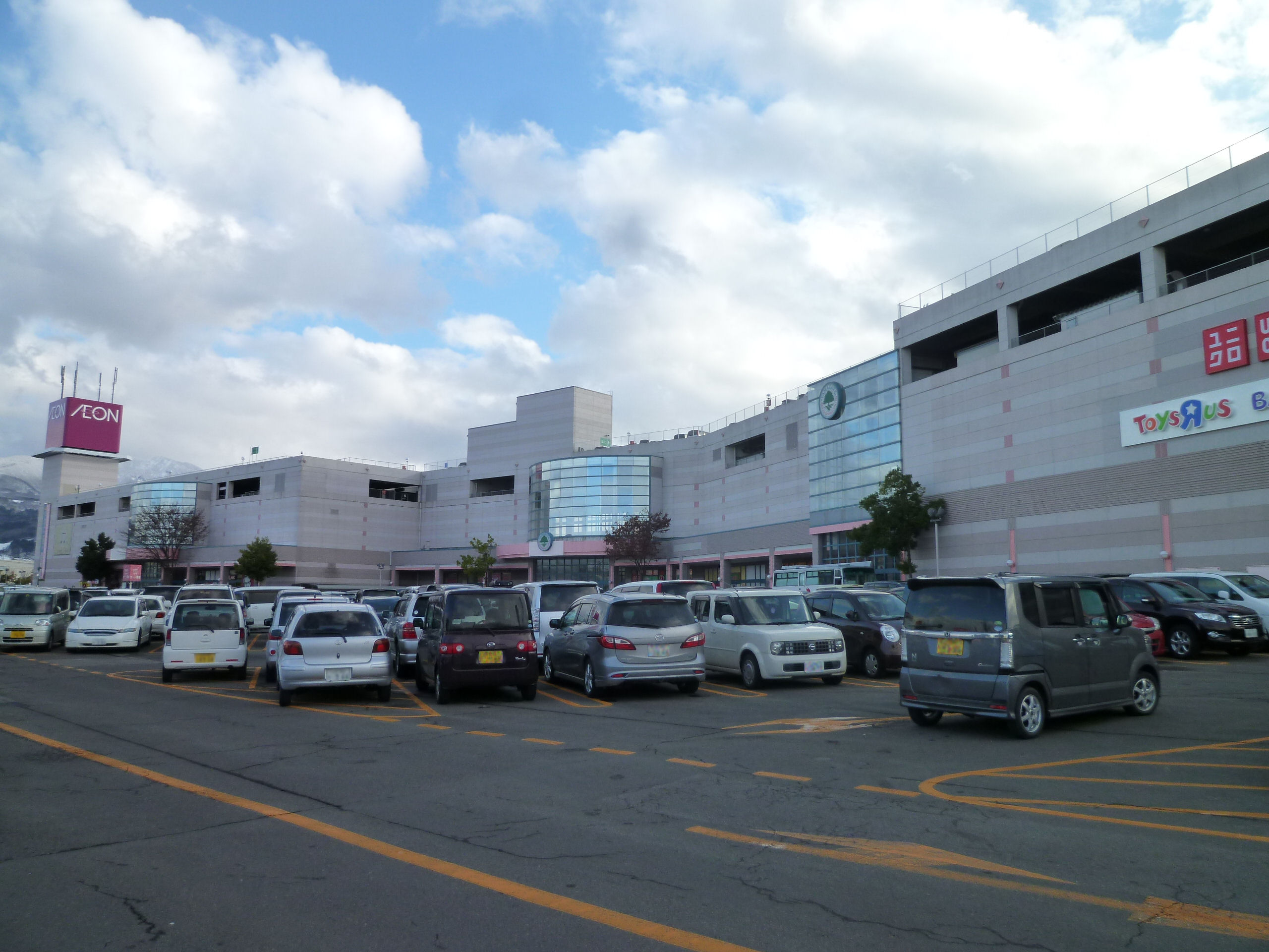 イオンモール山形南。 山形県山形市若宮に所在。